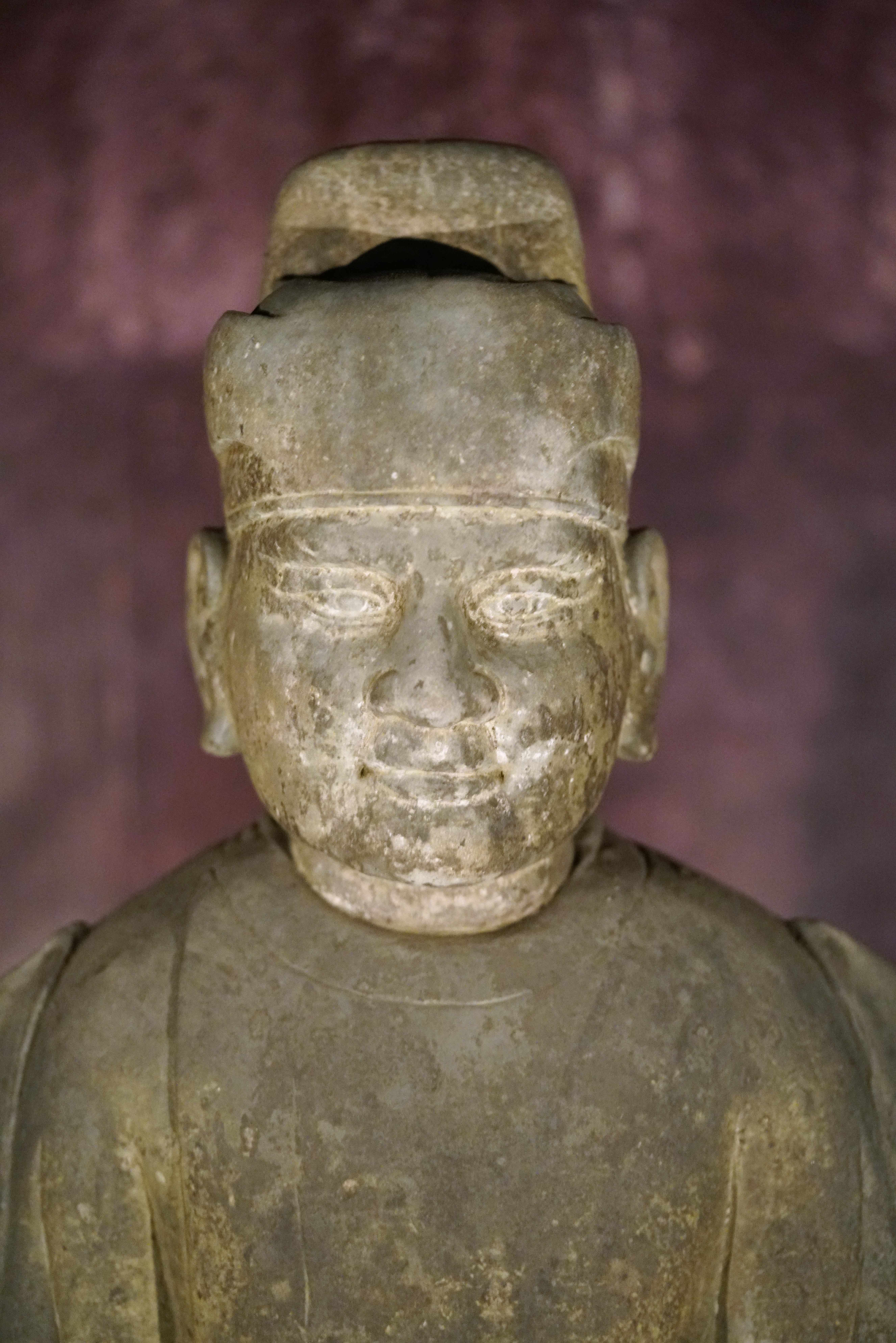 中文（中国大陆）: 王建像 头部